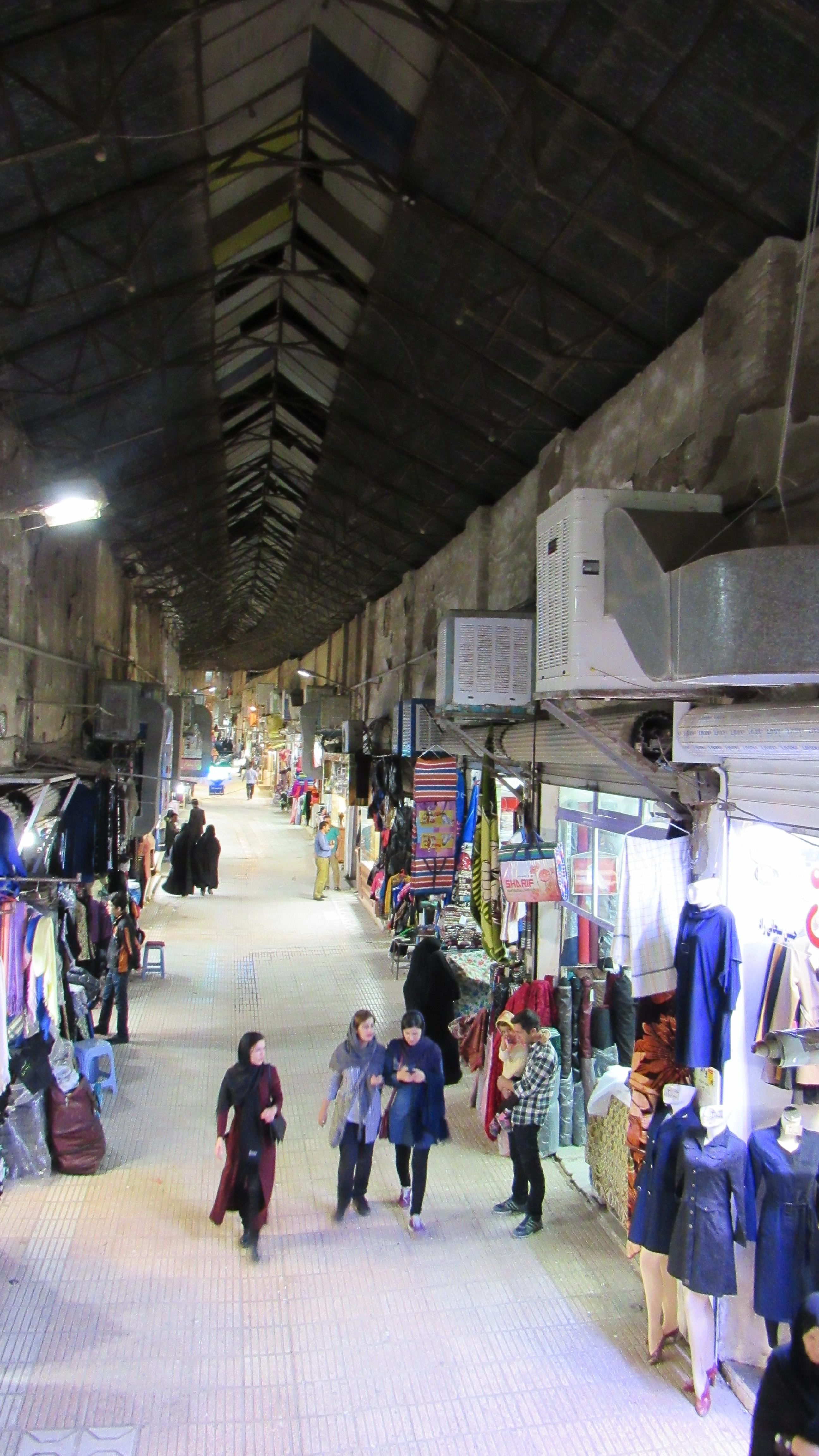 بازارسرپوشیده سبزوار